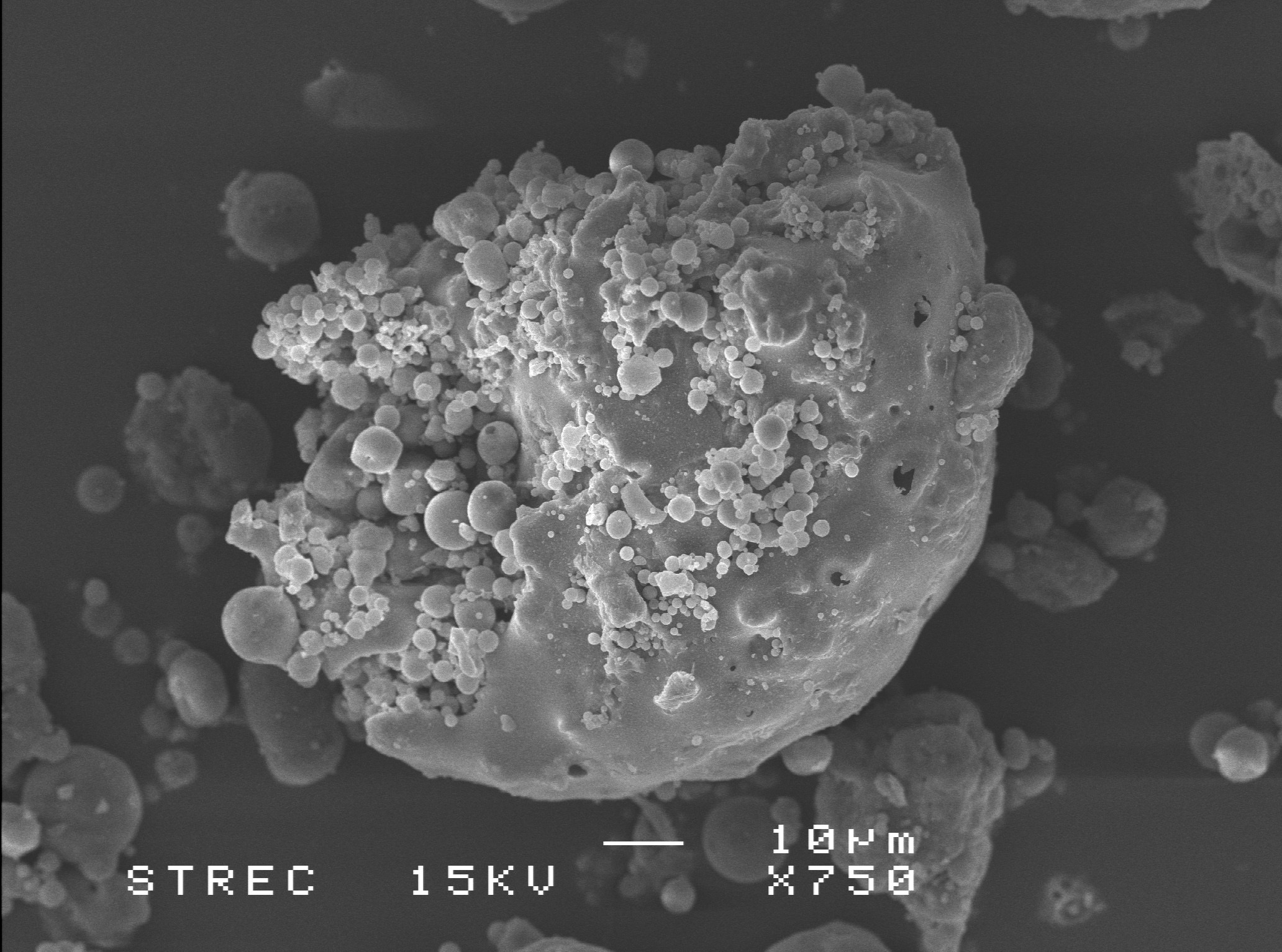 เถ้าลอย(FlyAsh) ส่องโดยกล้องจุลทรรศน์อิเล็กตรอน (SEM) 750X